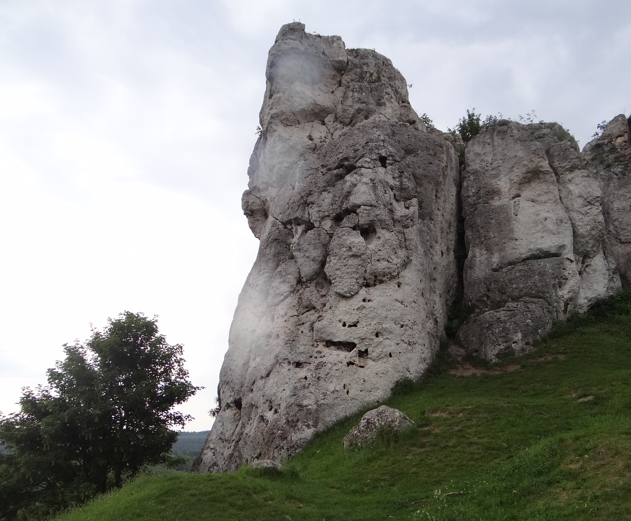 Skały Grupy Knura w Łutowcu